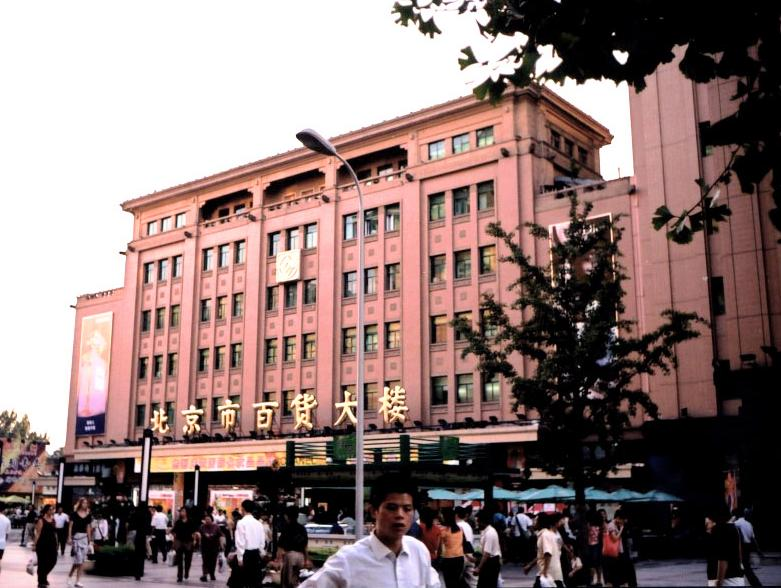 Wangfujing Beijing Department Store王府井北京市百货大楼